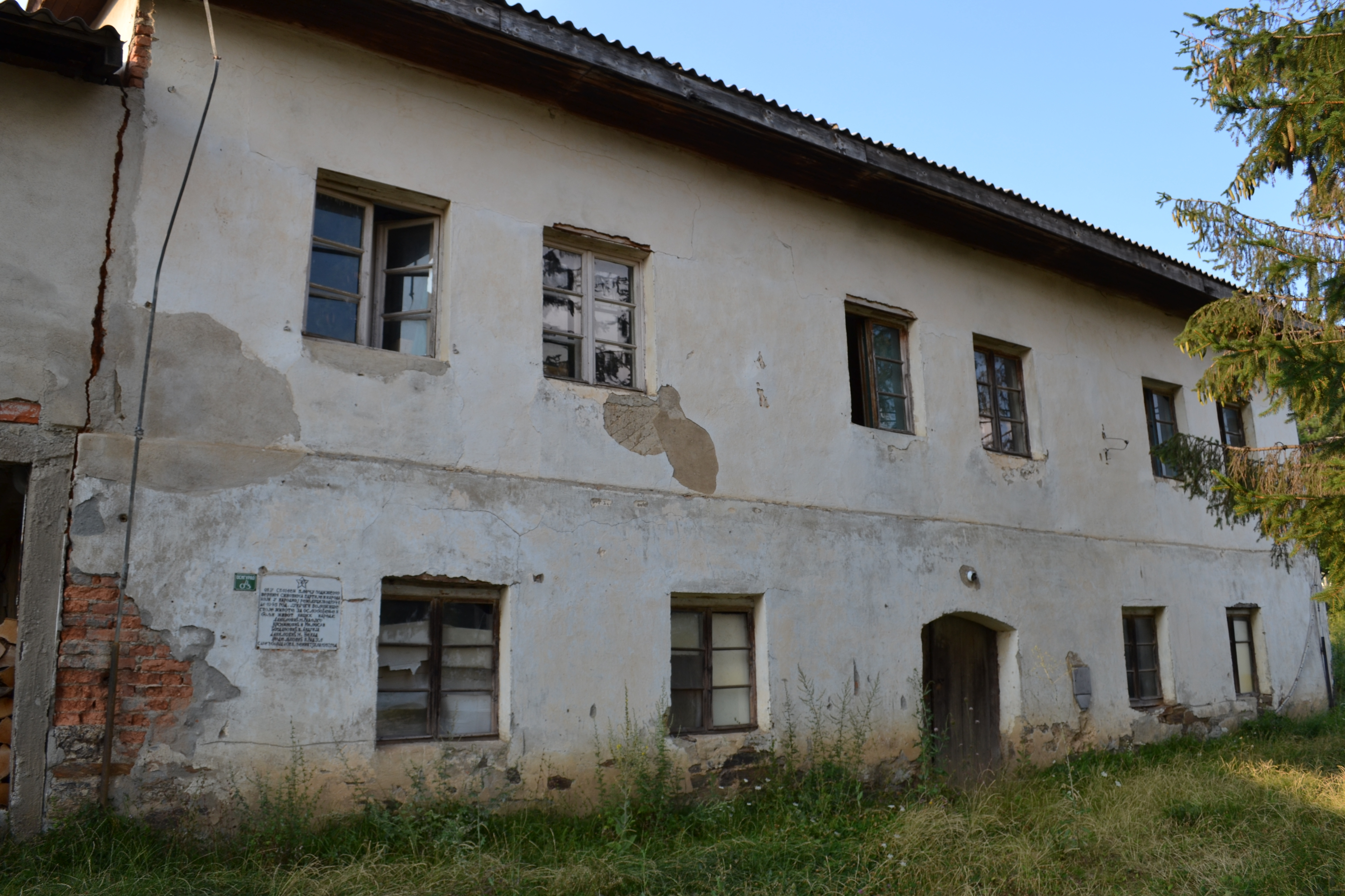 Škola u Opaljeniku